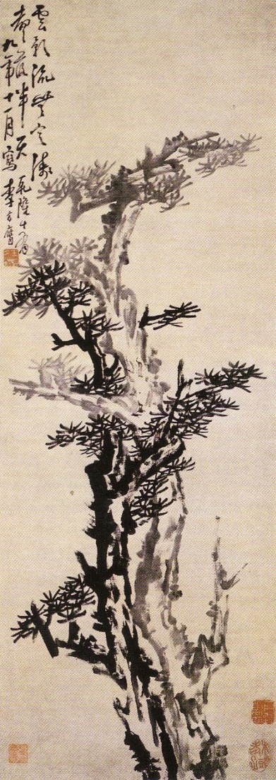 Vieux pins par Li Fangying en 1753. Rouleau mural, encre sur papier. 123x43,6cm. Musée du palais impérial. Beijing.